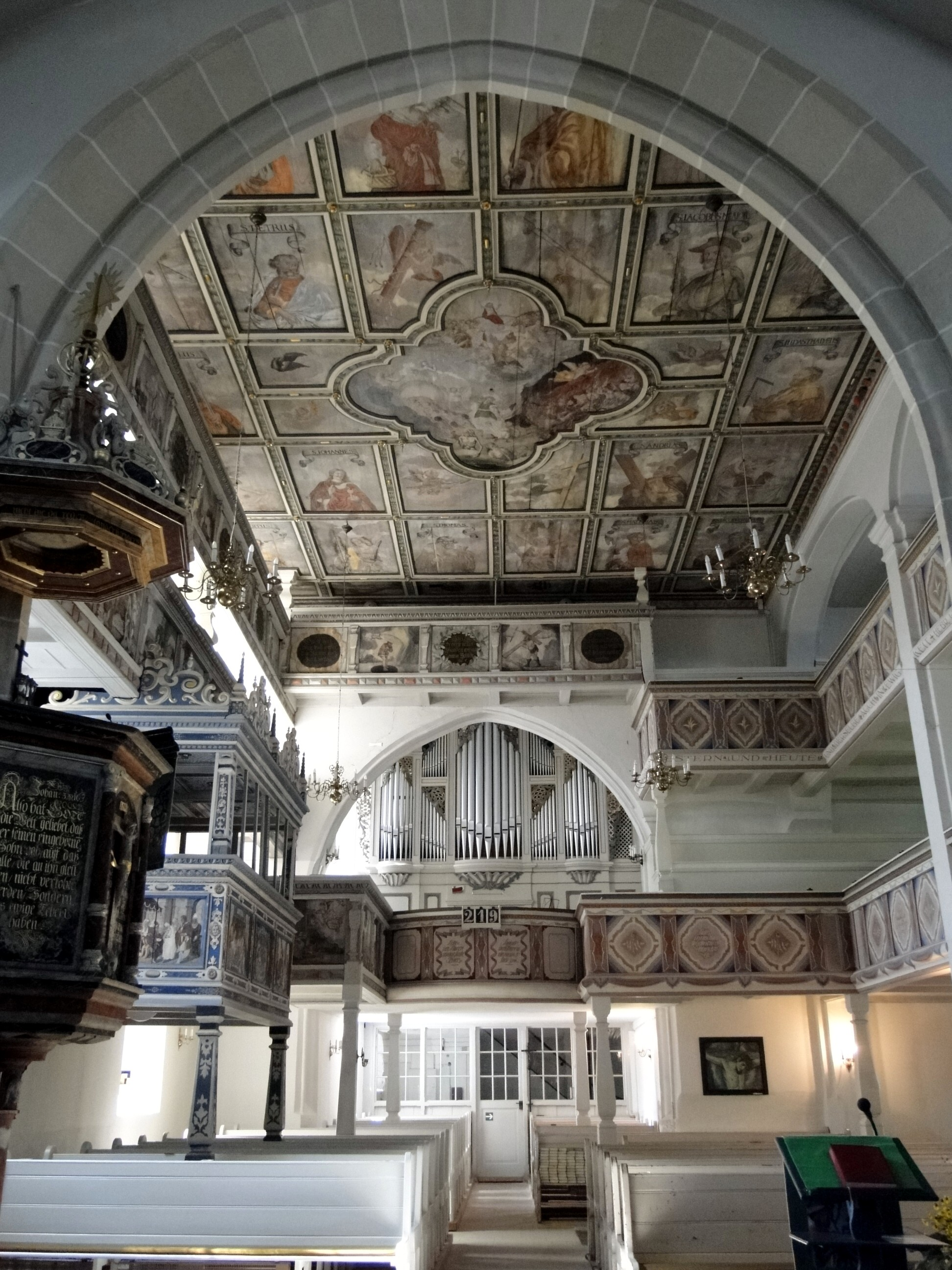 Innenraum Kirche Leubnitz-Neuostra